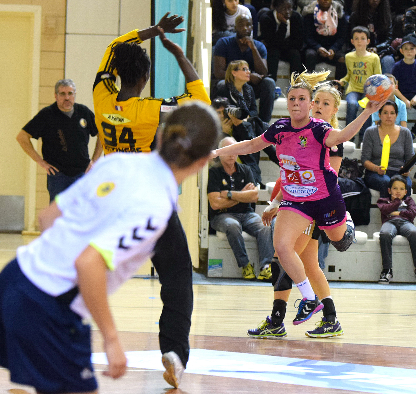 Julie Godel Le 06 novembre 2015, lors du match Issy Paris Hand / Nantes LAHB comptant pour la 11e journée de LFH. Au stade Robert Carpentier à Issy-les-moulineaux.